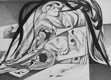 Karl Lorenz Kunz - Federzeichnung: Inferno